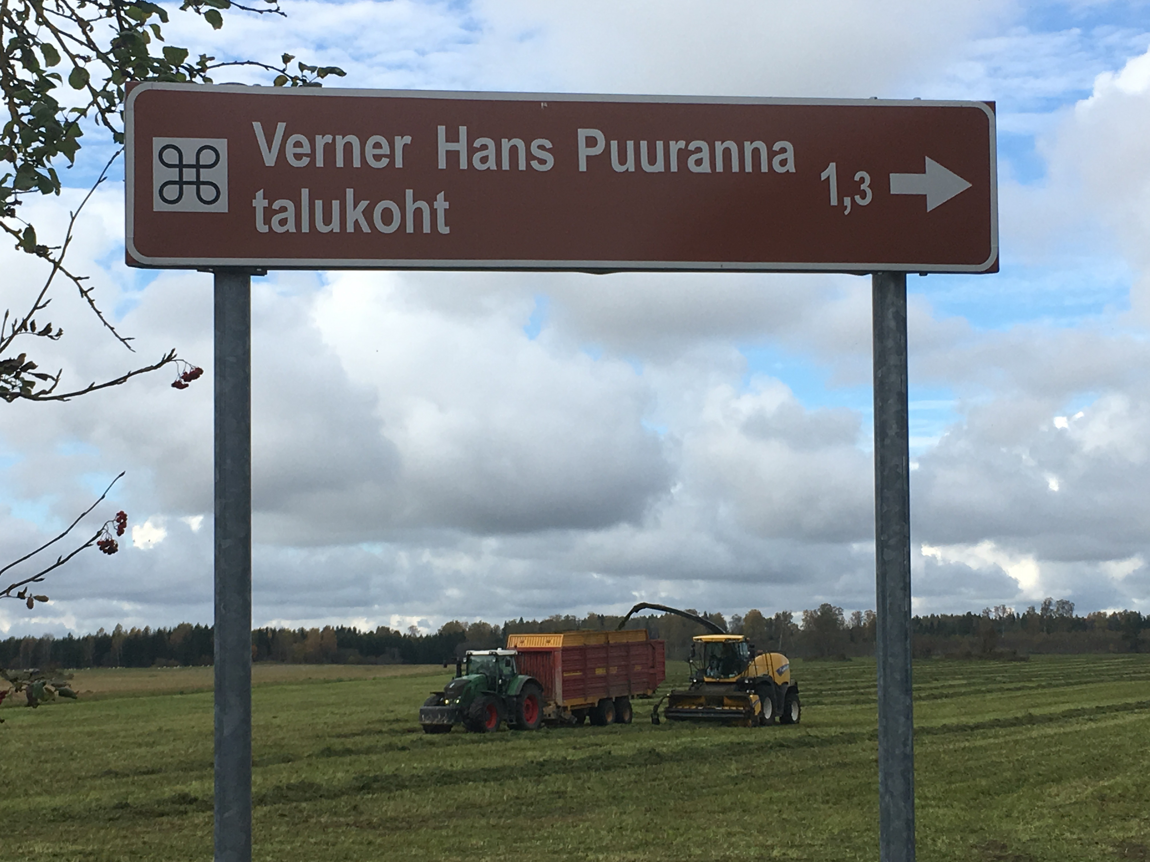 V. H. Puuranna mälestusmärgi suunaviit. JK Otsa talu tehnika Tooma põllul.